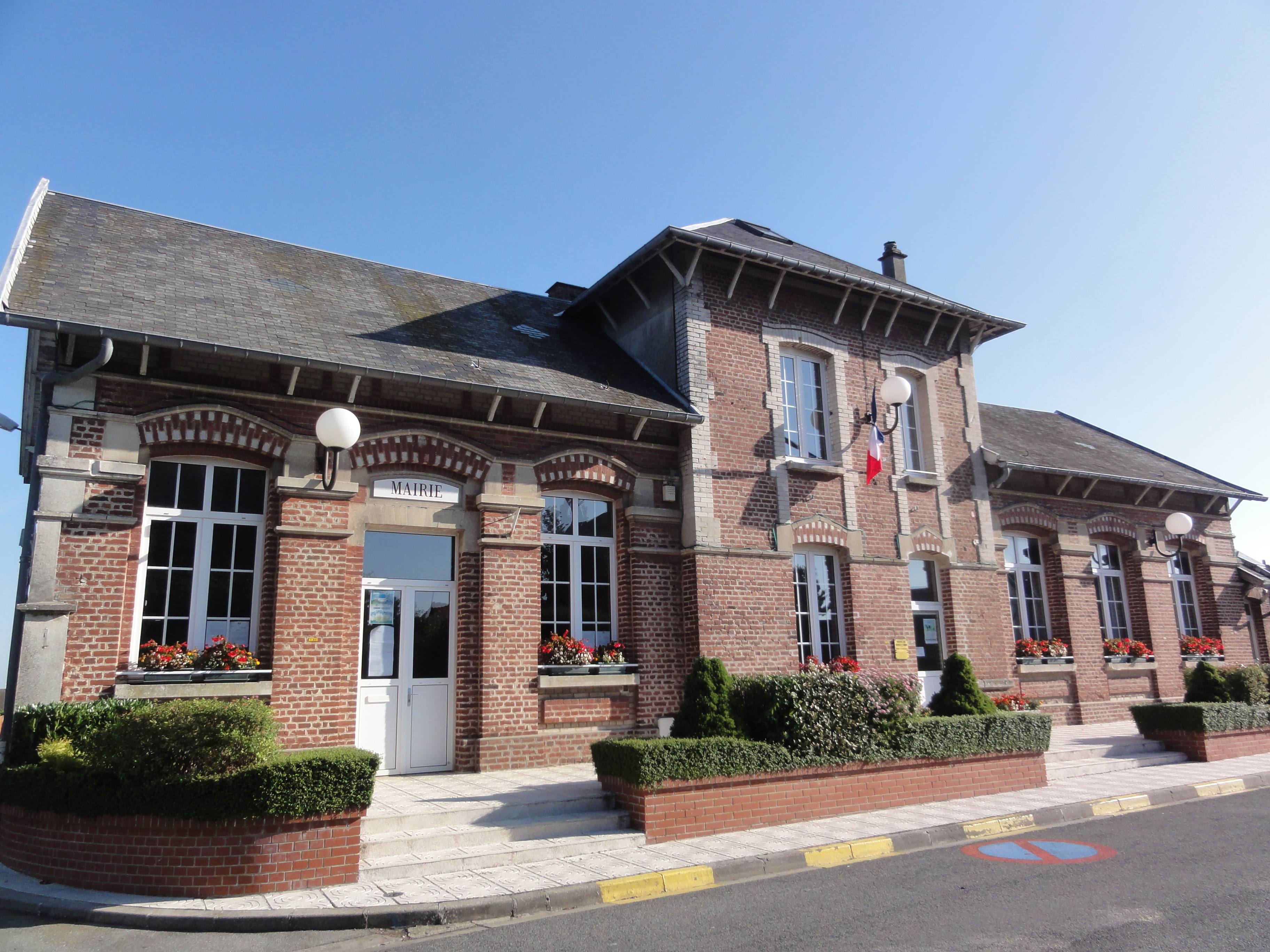 Neuville-Saint-Amand (Aisne) mairie